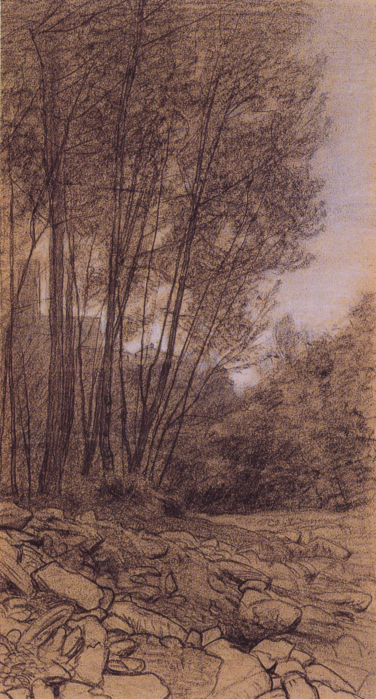 Rivara